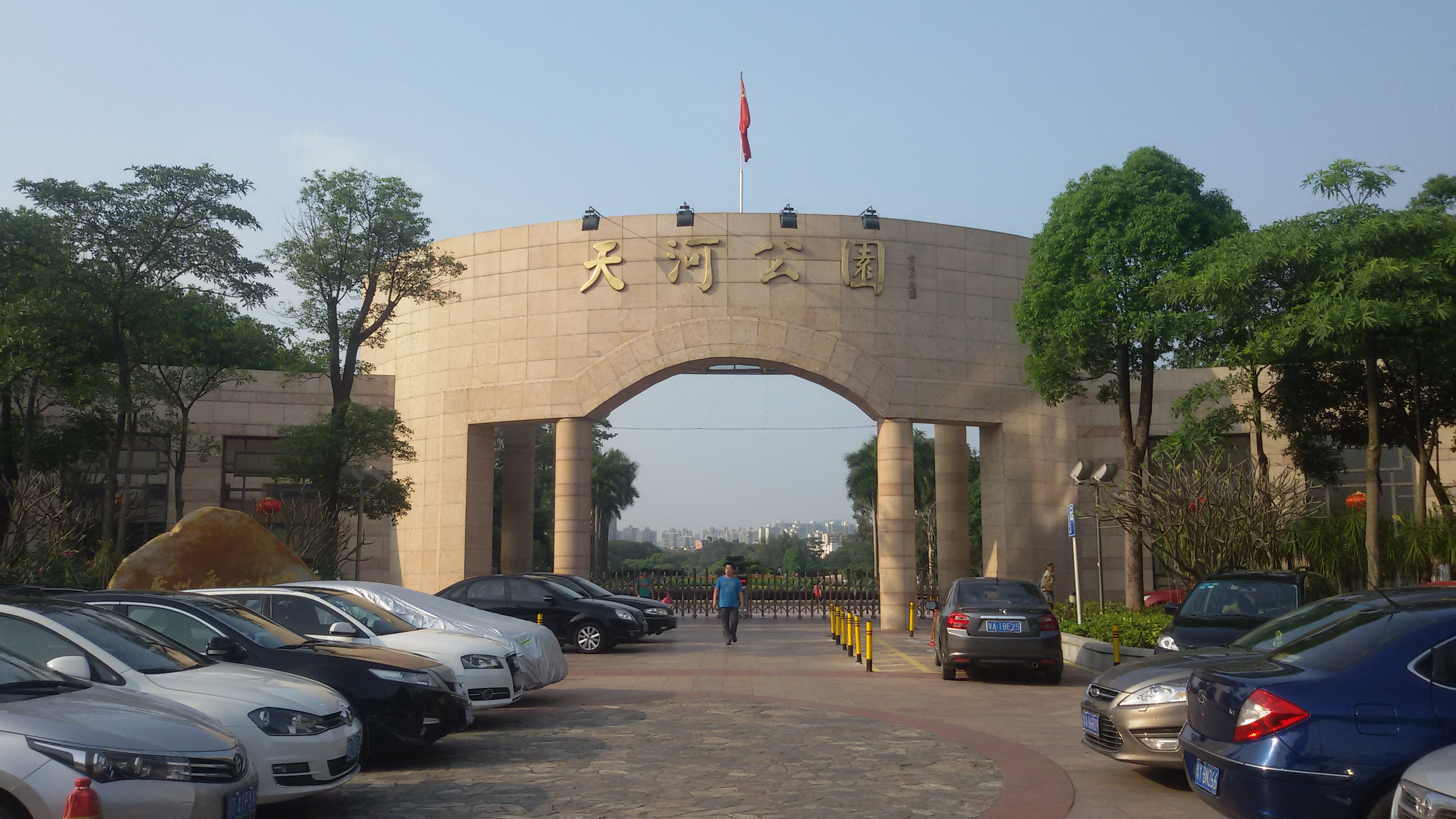 粵語: 天河公園嘅南門